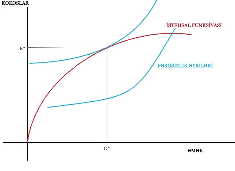 Robinzon Kruzo iqtisadiyyatının istehsal funksiyası və fərqsizlik əyriləri